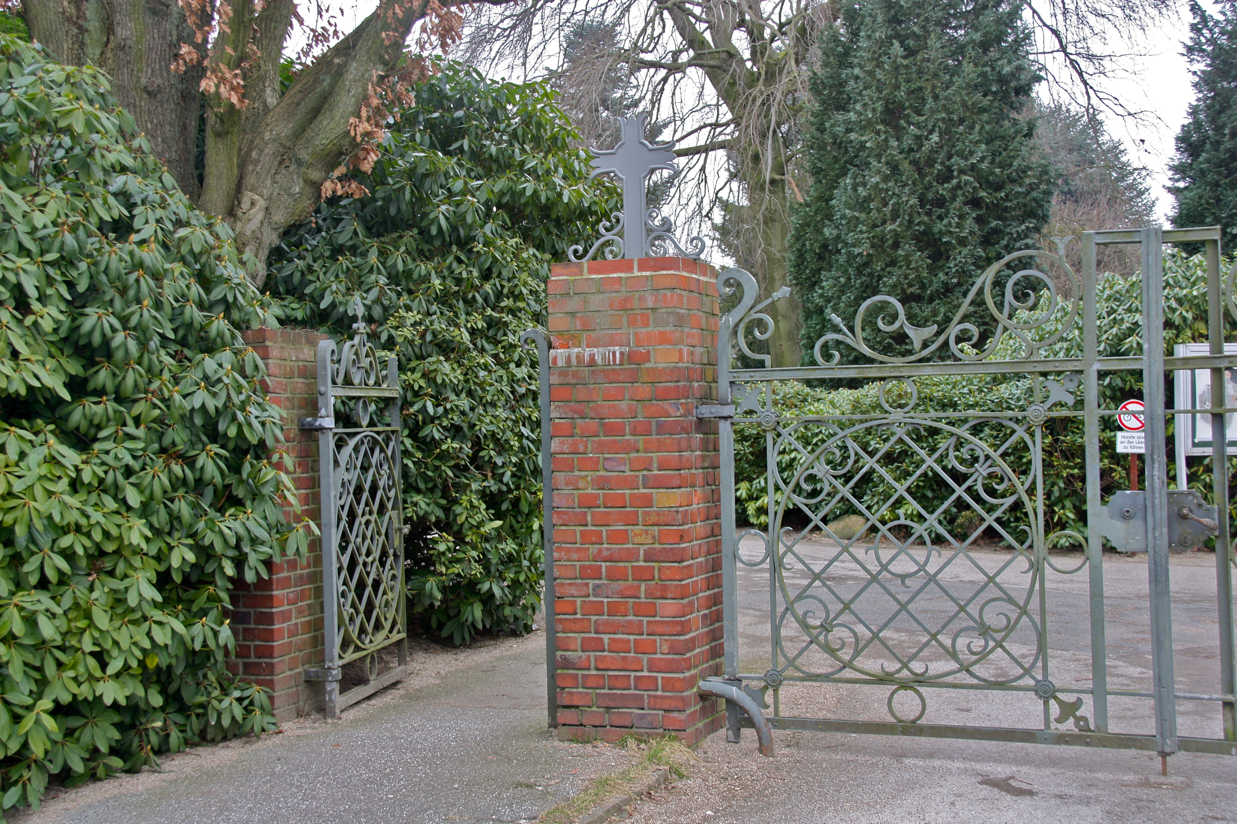 Hamburg, Neuer Niendorfer Friedhof, Eingang Sootbörn